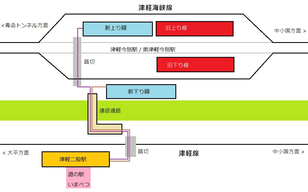 新的津輕今別站及津輕二股站的連絡圖